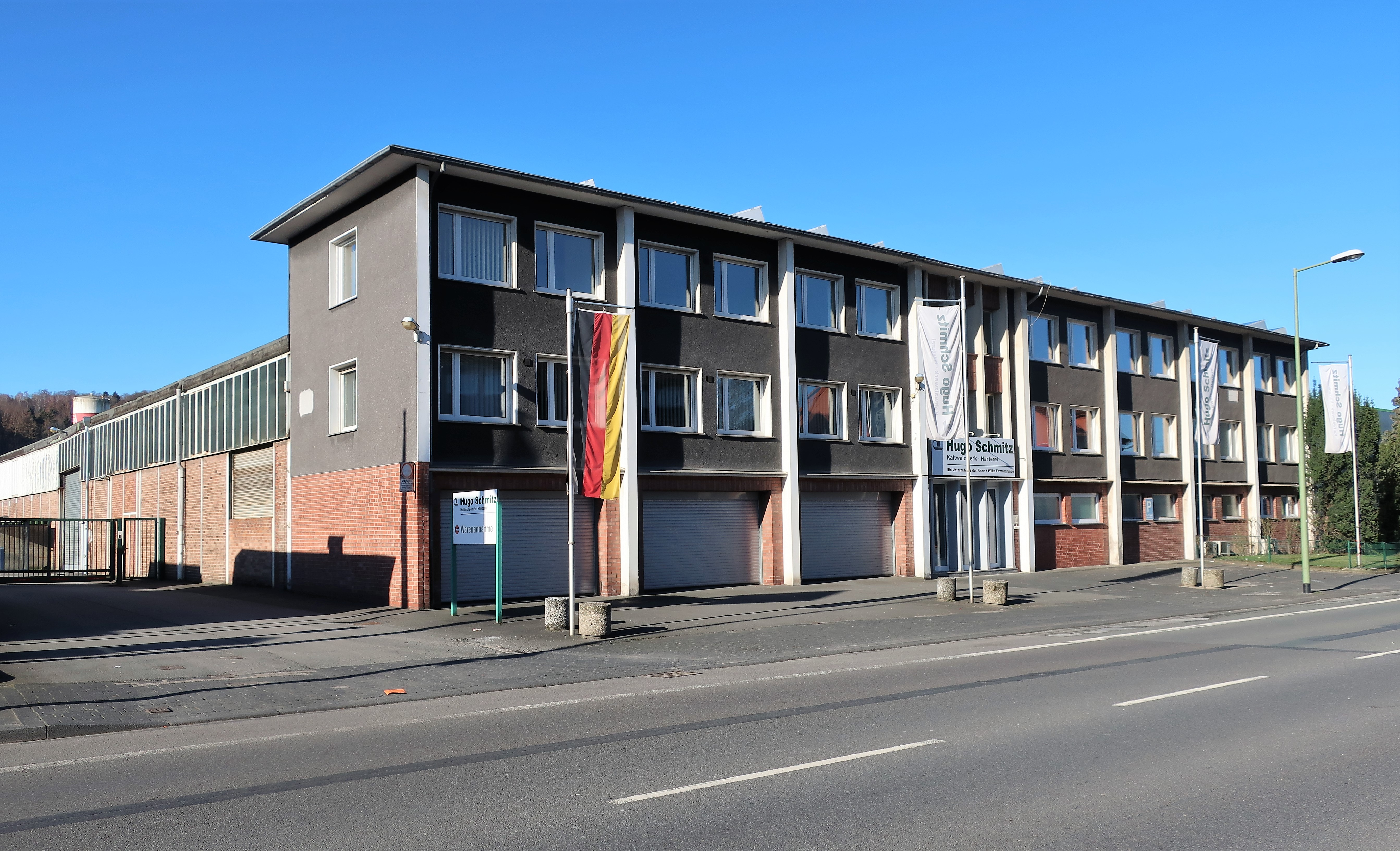 Hugo Schmitz GmbH & Co. KG, Kaltwalzwerk - Härterei, in Hagen-Hohenlimburg, Elseyer Straße 47-51. Die 1876 gegründete Firma ist seit 2017 ein Unternehmen der Risse & Wilke Firmengruppe.